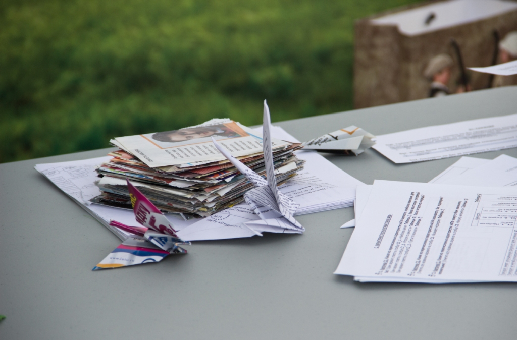 Поделки из старых журналов на экологическом арт-мобе, состоявшемся в Тюмени 5 июня 2013 года, во Всемирный день окружающей среды.